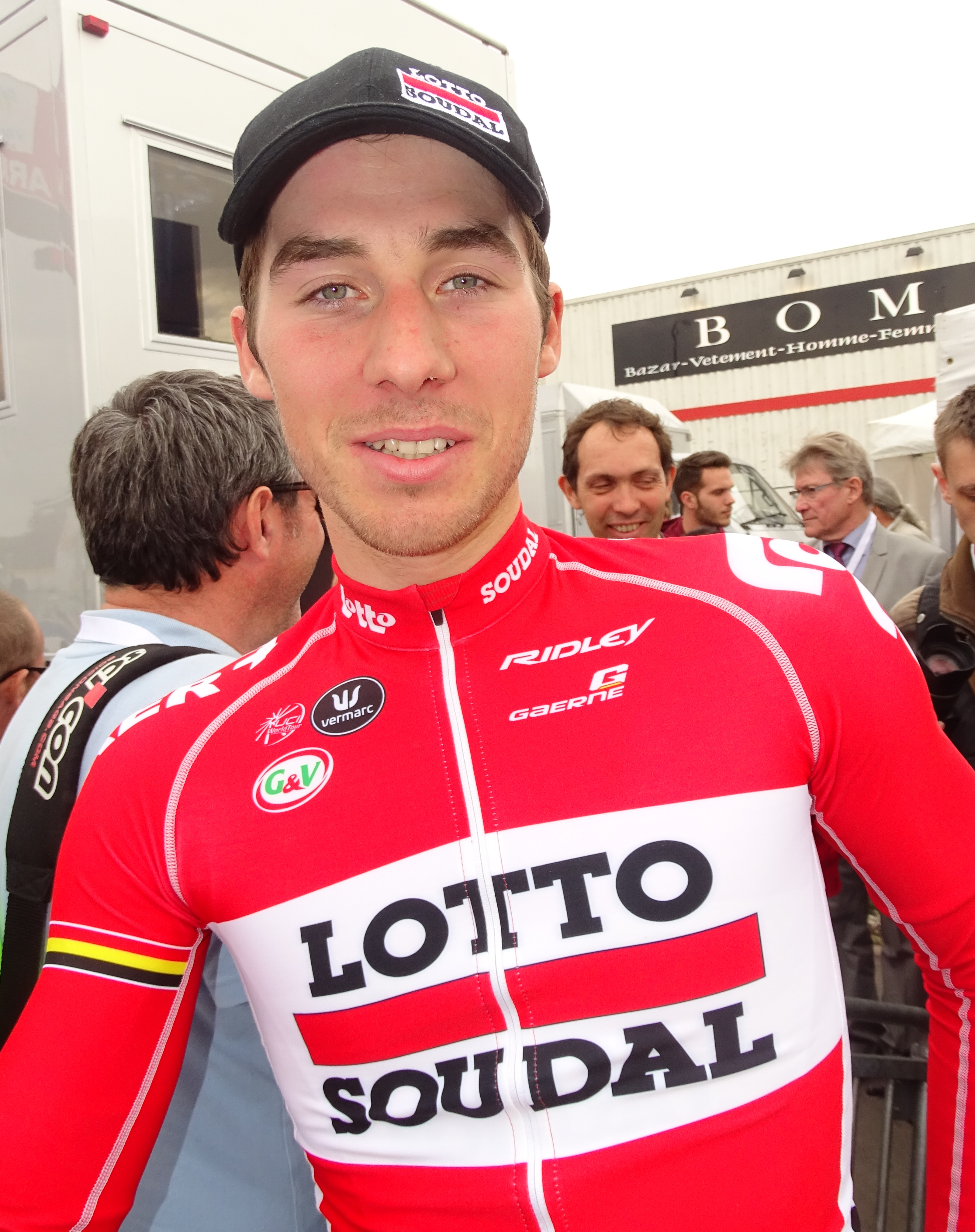 Reportage réalisé le jeudi 16 avril à l'occasion du départ et de l'arrivée du Grand Prix de Denain 2015 à Denain, Nord, Nord-Pas-de-Calais, France.